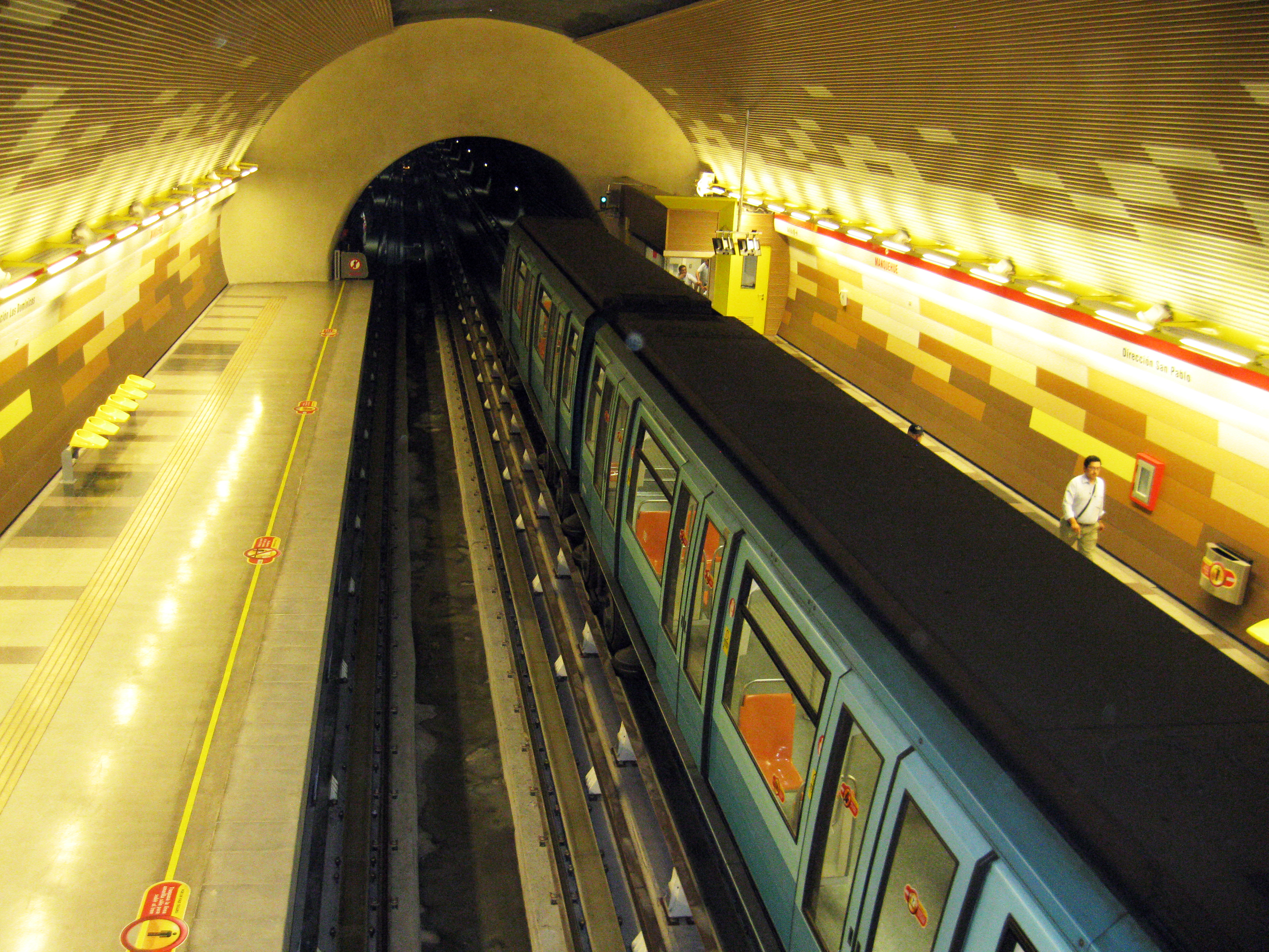 Estación Manquehue en la línea 1 del Metro de Santiago